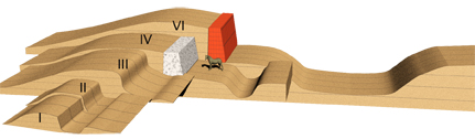 Abfolge der Danewerk-Wallphasen, erstellt in 3ds MAX, eigene Lizenz